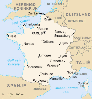 Nederlandstalige kaart van Frankrijk